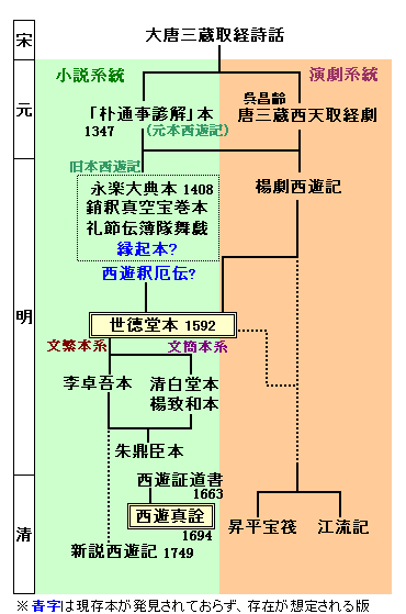 『西遊記』各種刊本の系譜